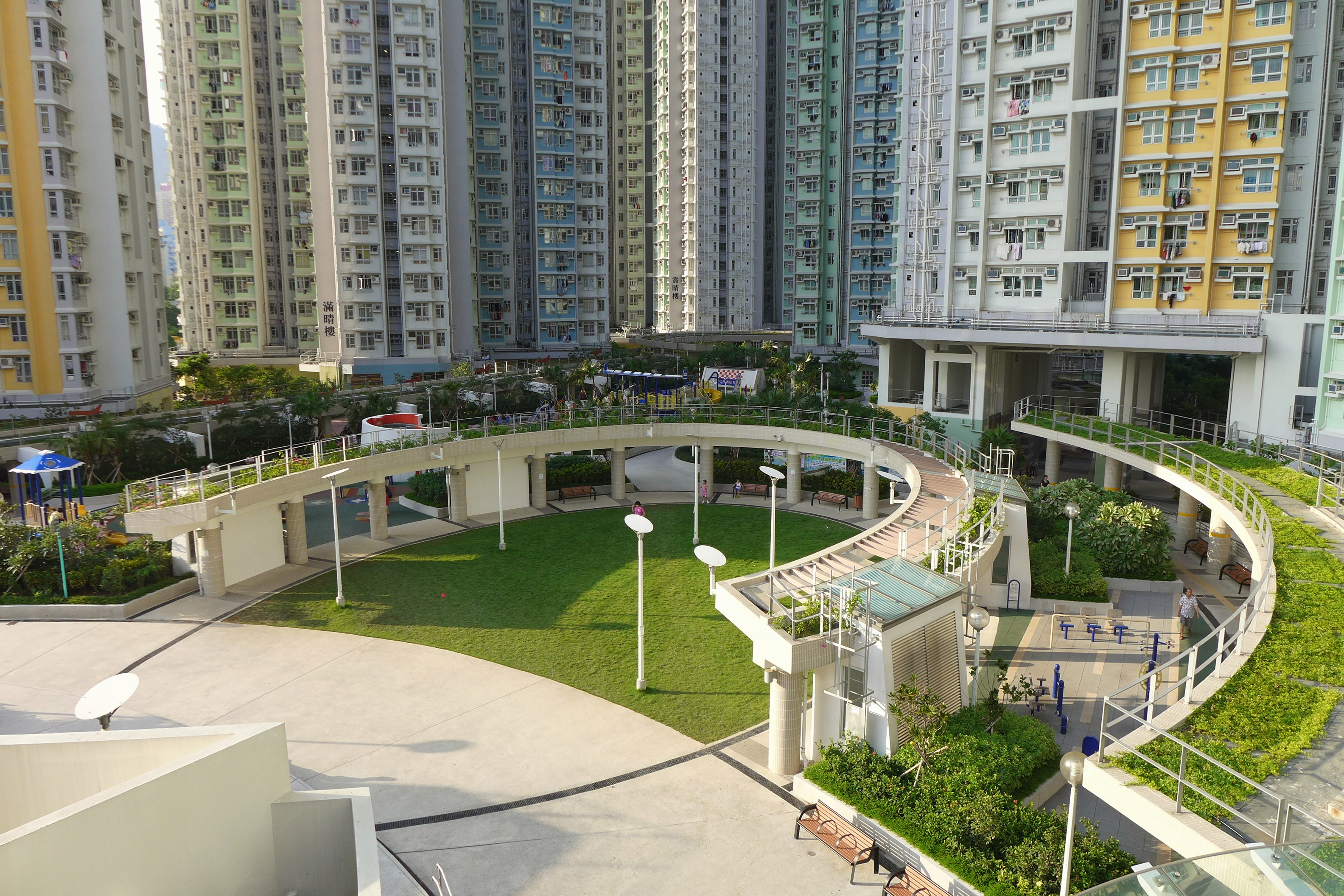 Kai Ching Estate Landscape Garden